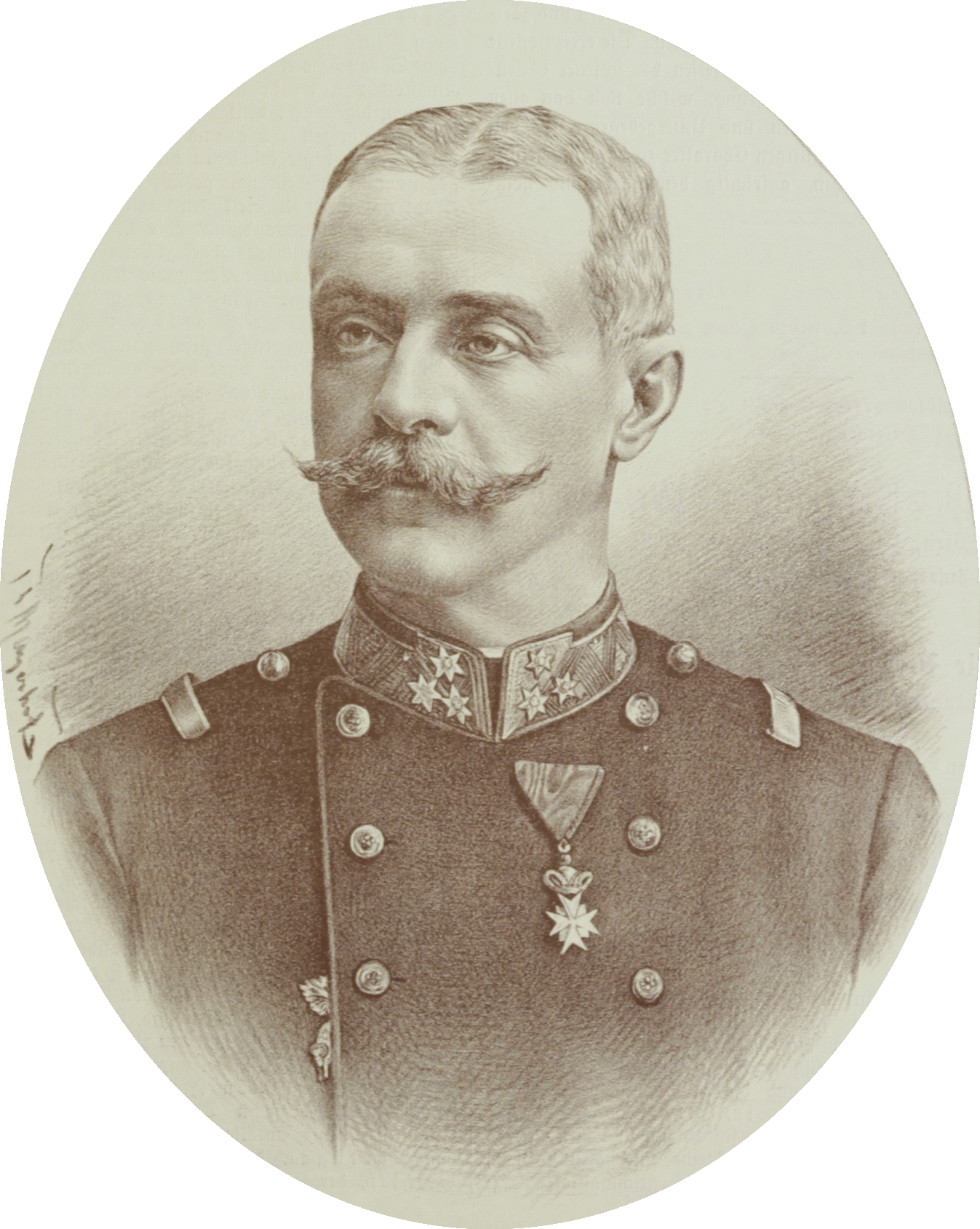 Rudolf Prinz von Liechtenstein (1838–1908), Austrian aristocrat and general